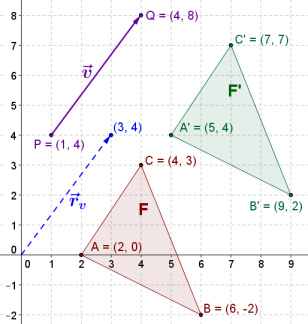 Координати и транслација на геометриска фигура